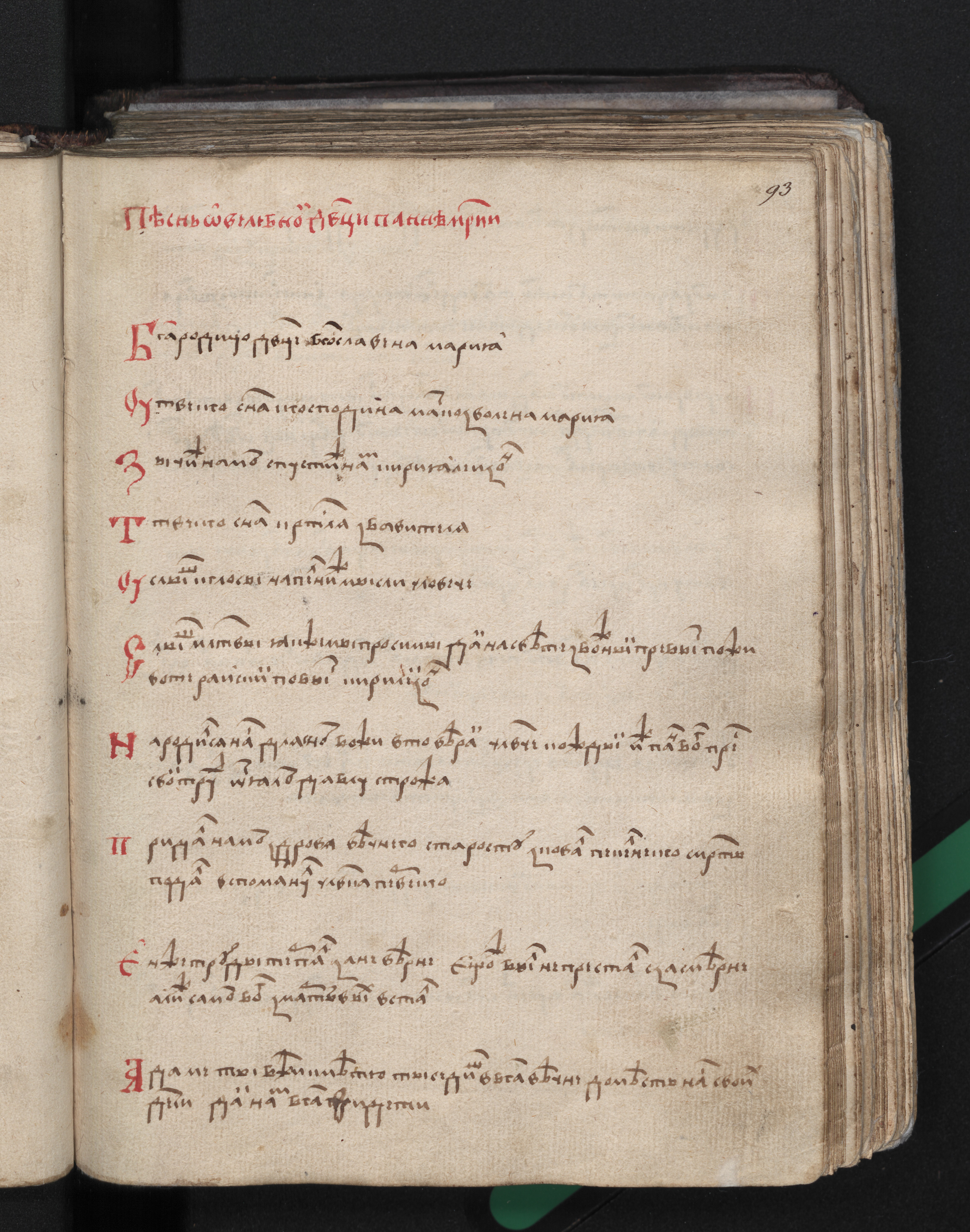 Словѣньскъ / ⰔⰎⰑⰂⰡⰐⰠⰔⰍⰟ: древнебеларуский